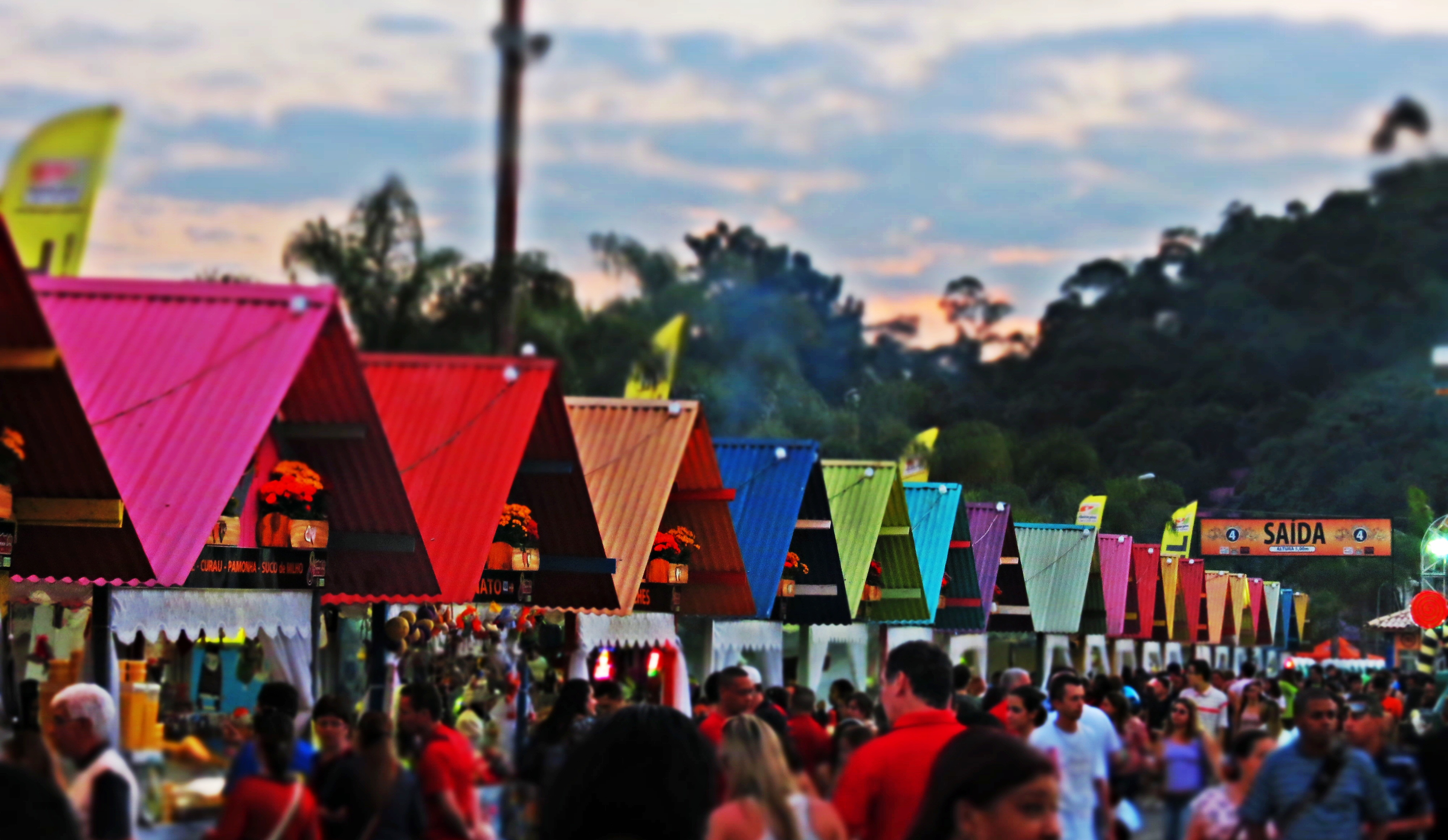 Festival do Chocolate de Ribeirão Pires